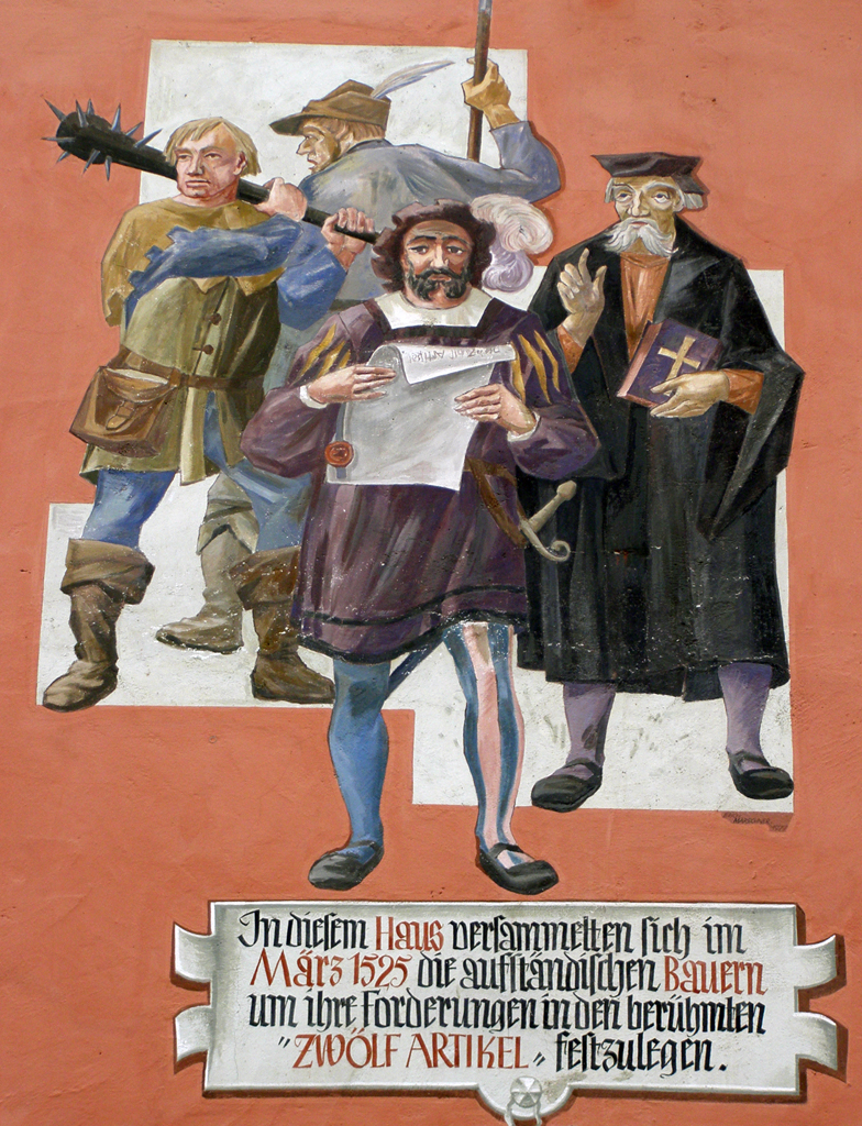 Memmingen Kramerzunft - 12 Artikel - Lotzer/Schappeler